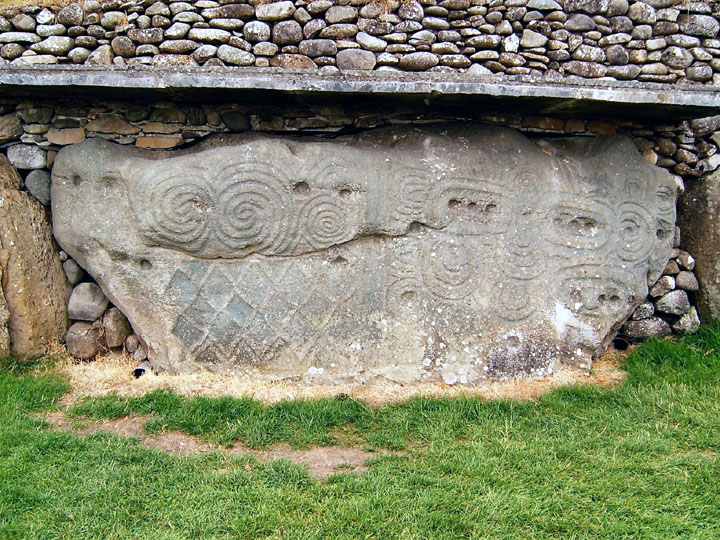 Neolitikus szegélykő Newgrange-ben (Brú na Bóinne)